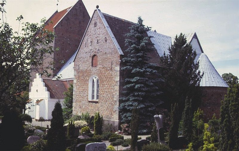 Marie Magdalene Kirke i Danmark. Marie Magdalene kirke